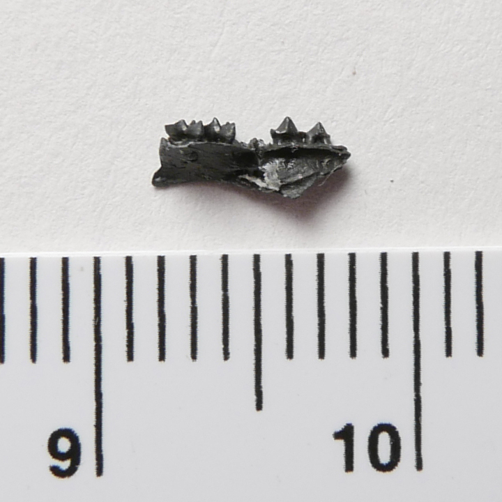 Peradectes gulottai Rose, 2010